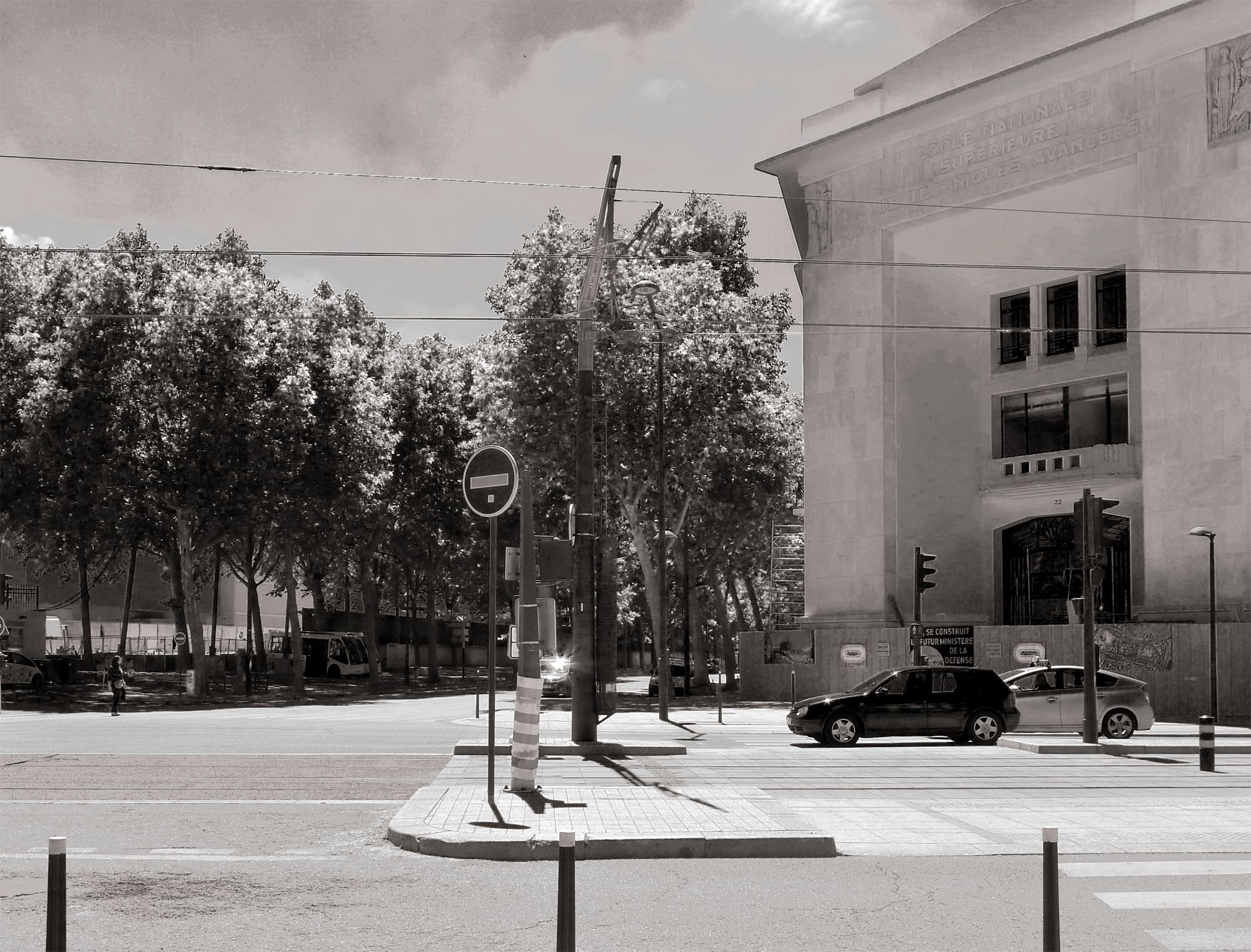 Porte d'Issy - Paris XV, Ancien siège de l'École nationale supérieure de techniques avancées